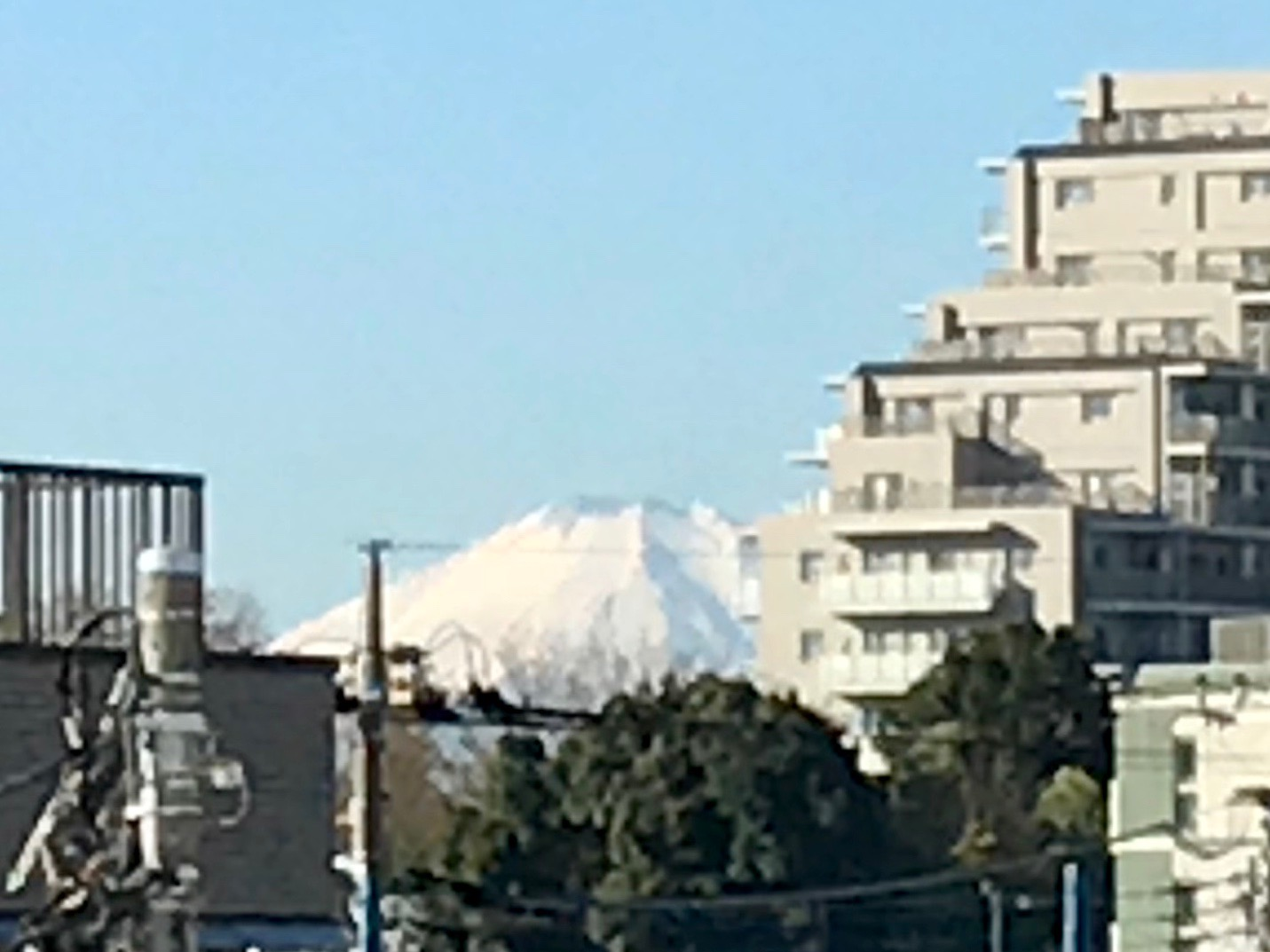 八坂駅(東京）2017現在の富士山眺望